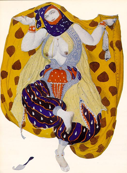 Эскиз костюма к балету "Шахерезеда",1910 Projet de costume pour une odalisque du ballet Shéhérazade